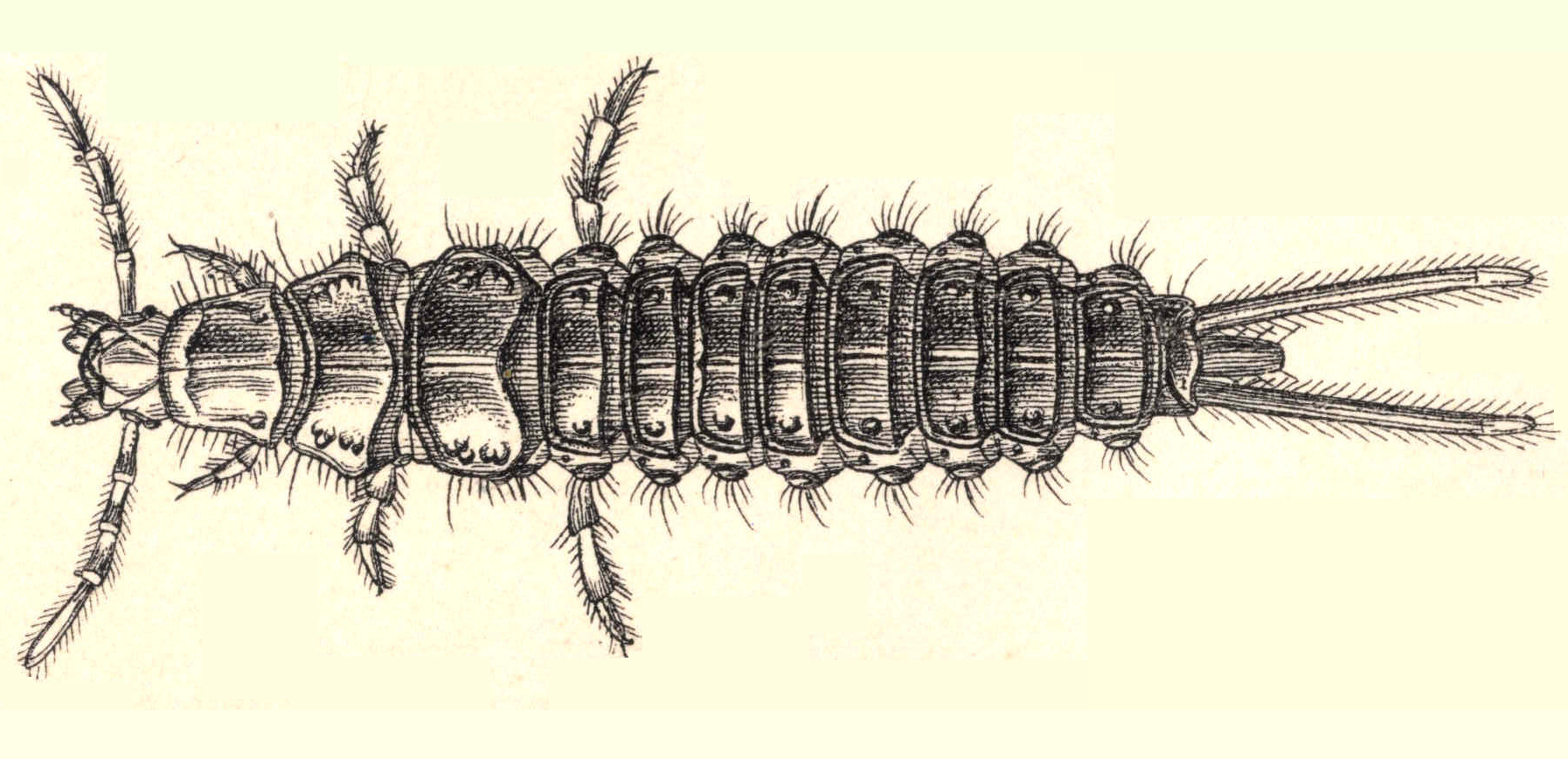 Larva